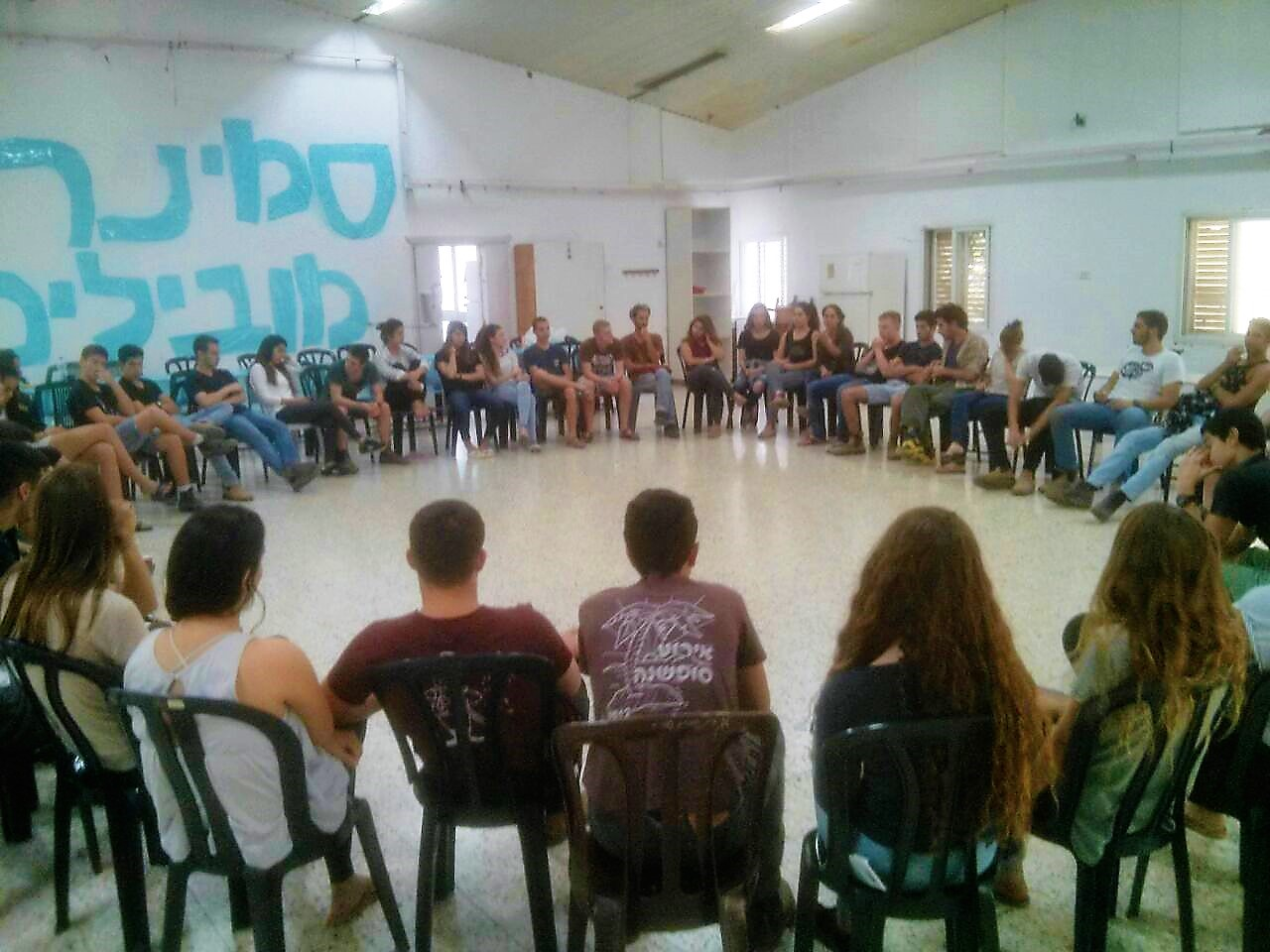 חניכים במליאה בסמינר פתיחת שנה